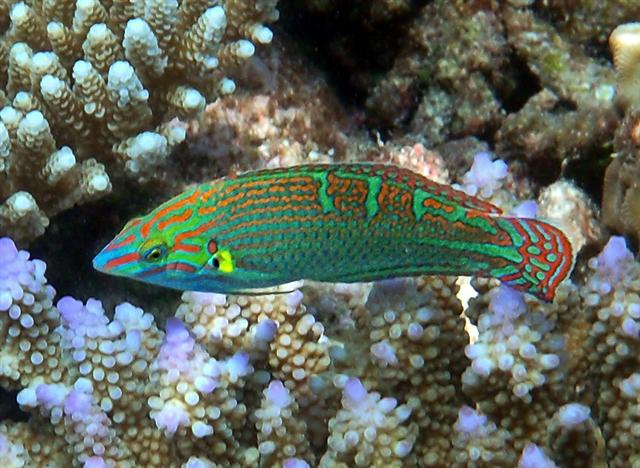 maschio di Halichoeres vrolikii